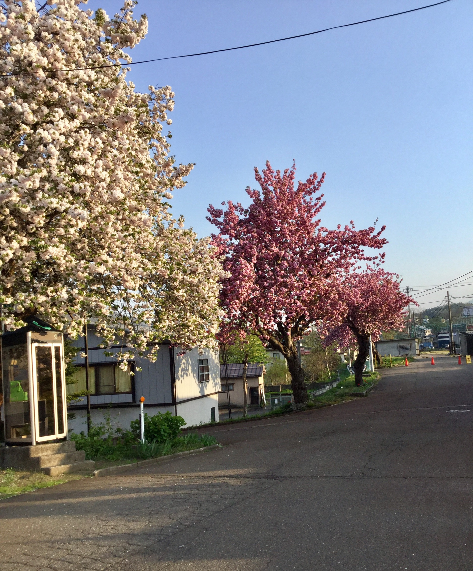 えちごトキめき鉄道妙高はねうまラインの二本木駅前にある桜｡2017年4月30日に撮影｡